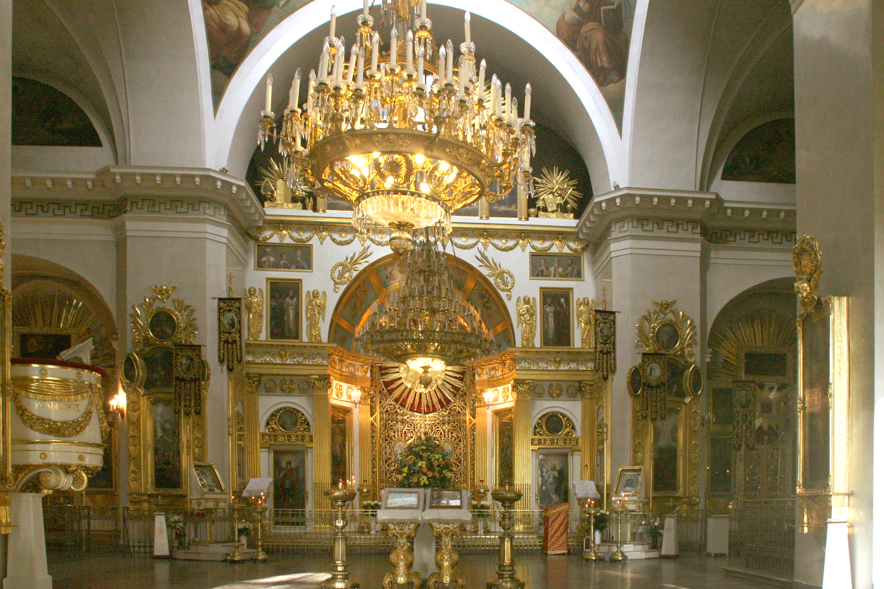 Cathédrale de la Transfiguration